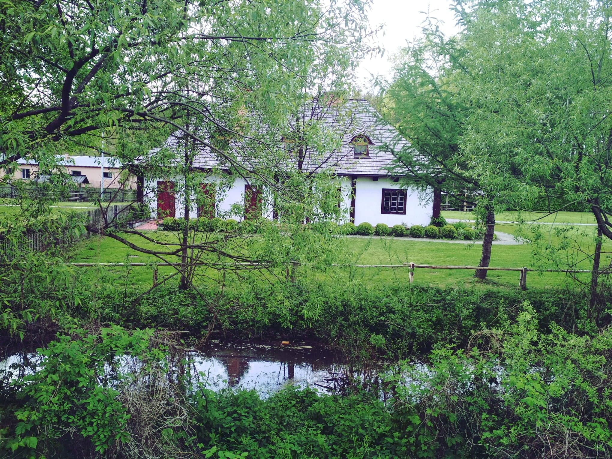 Potok Brzezówka, gmina Kolbuszowa, powiat kolbuszowski, województwo podkarpackie. Muzeum Kultury Ludowej w Kolbuszowej